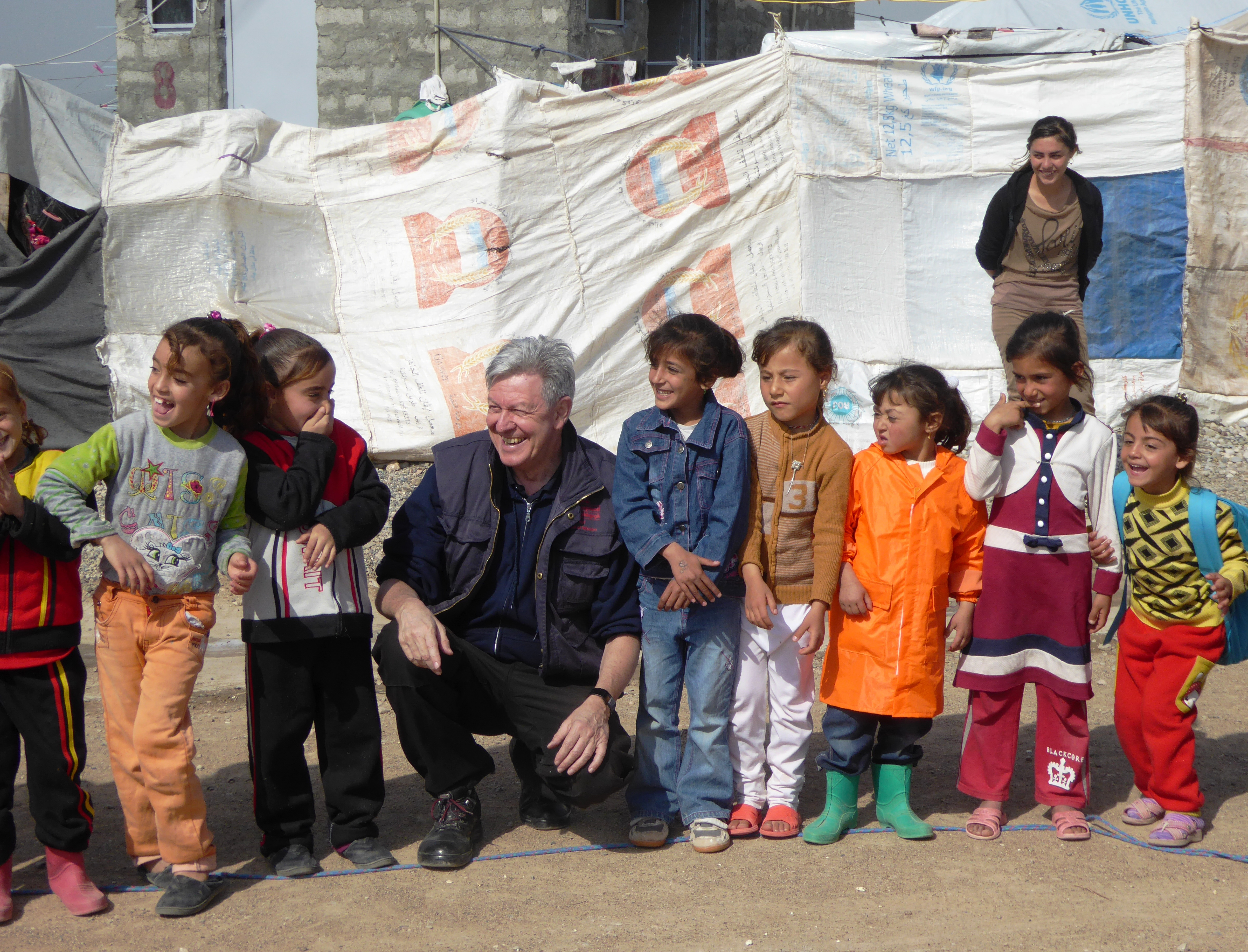 Bernd Ruf im notfallpädagogischen Einsatz im Flüchtlingslager im Irak.